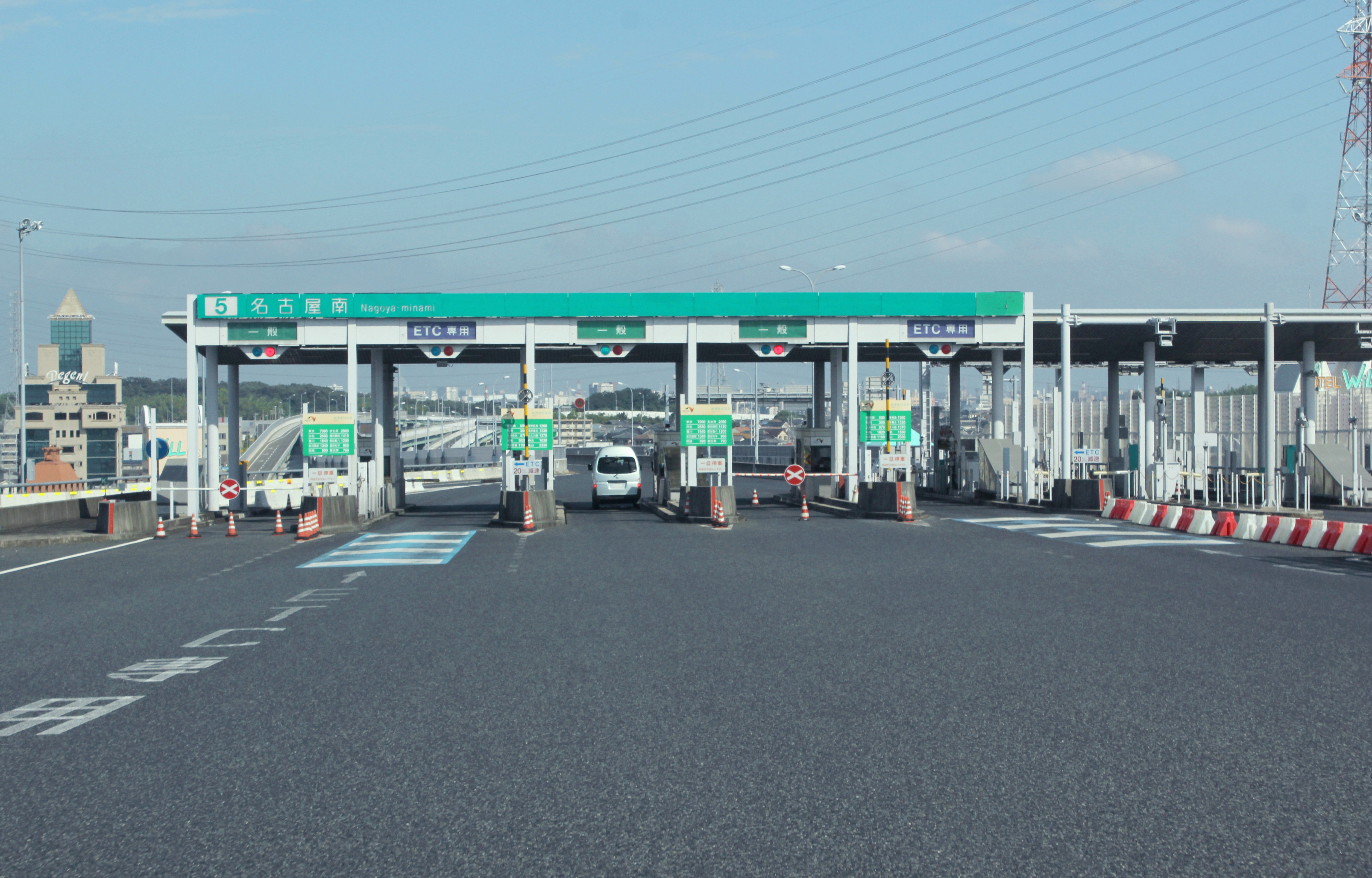 名古屋南JCT料金所（伊勢湾岸→名古屋高速）